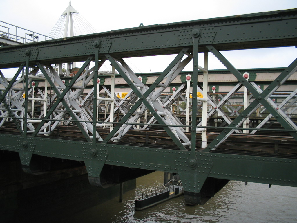 stalen vakwerk brug, Londen, oktober 2004